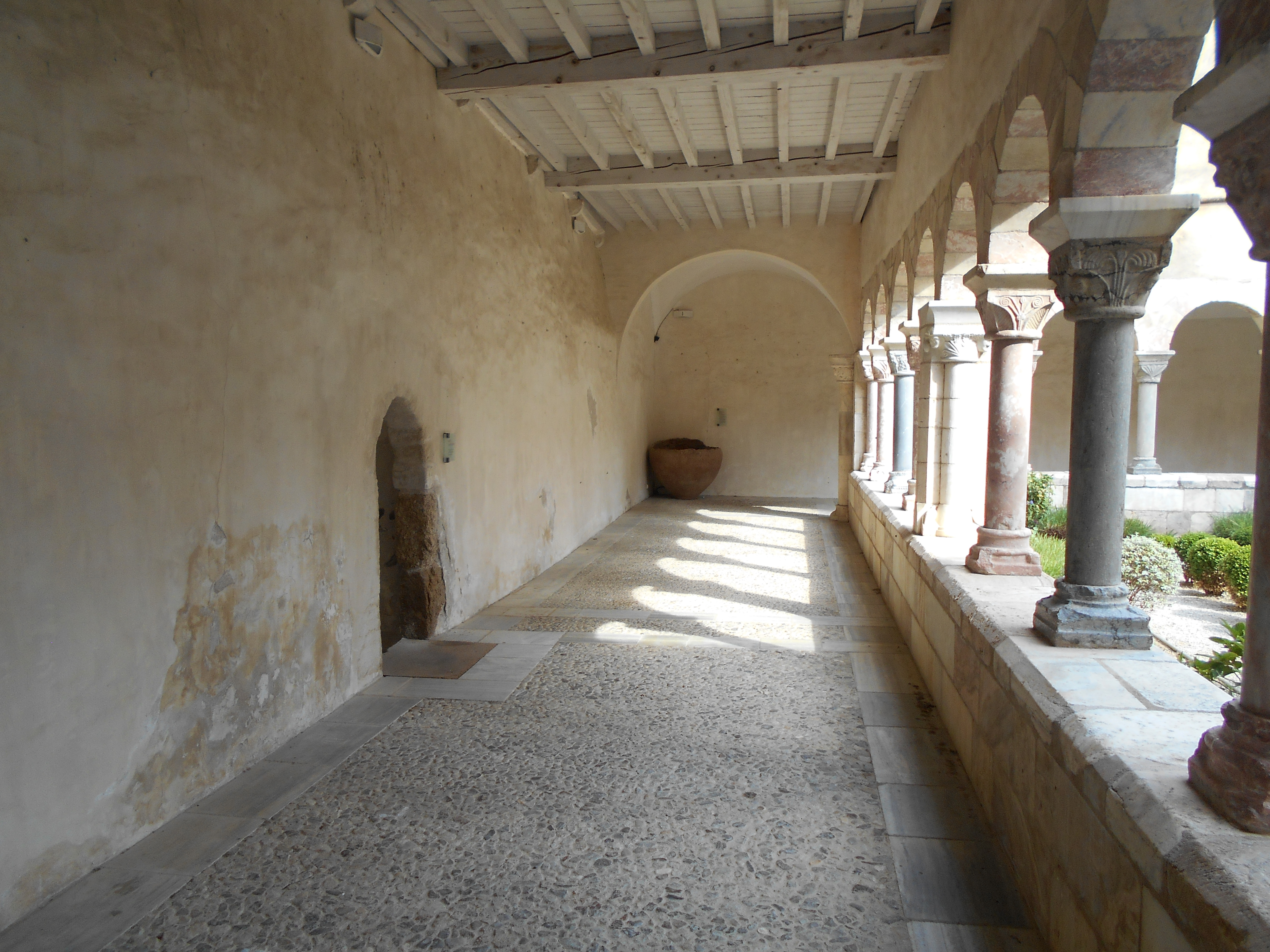 Galeria est del claustre de Sant Genís de Fontanes